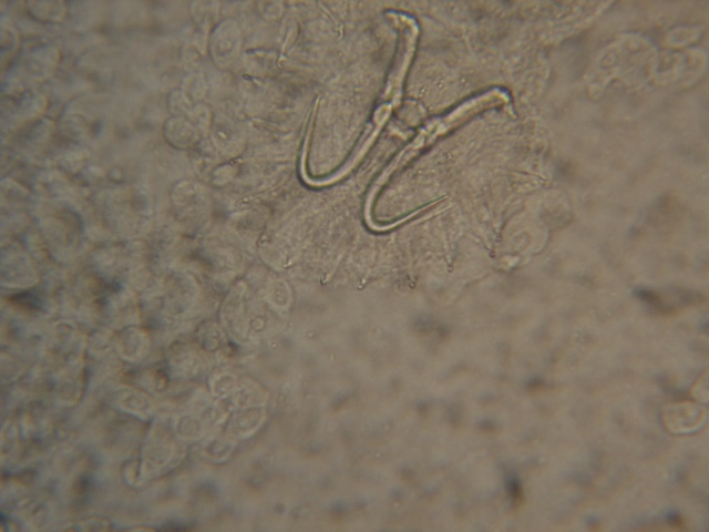 Gyrodactylus sp.